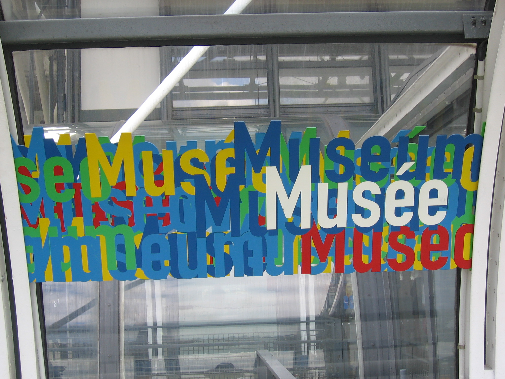 centre pompidou, paris.